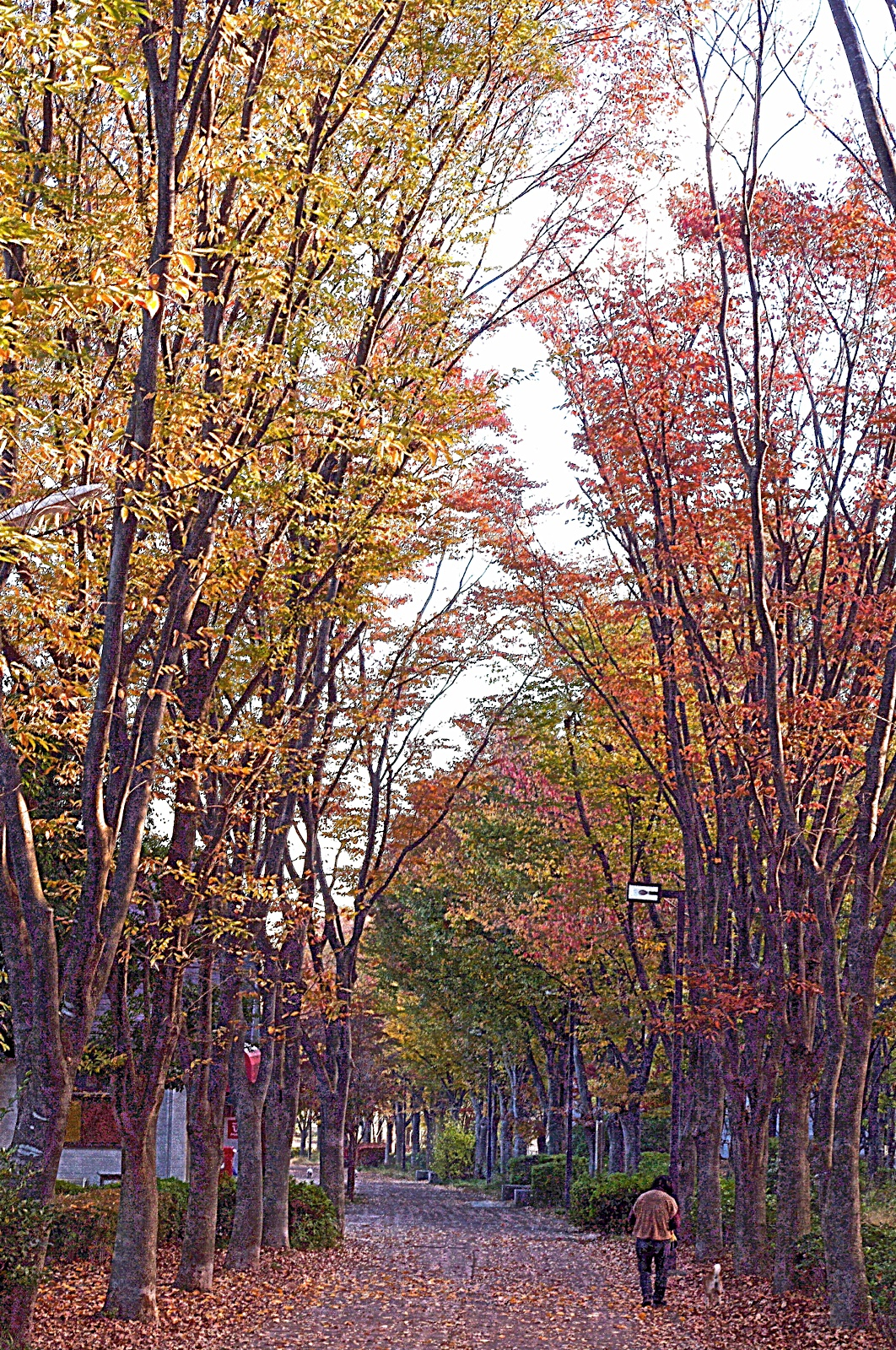 Chigasakiminami Autumn